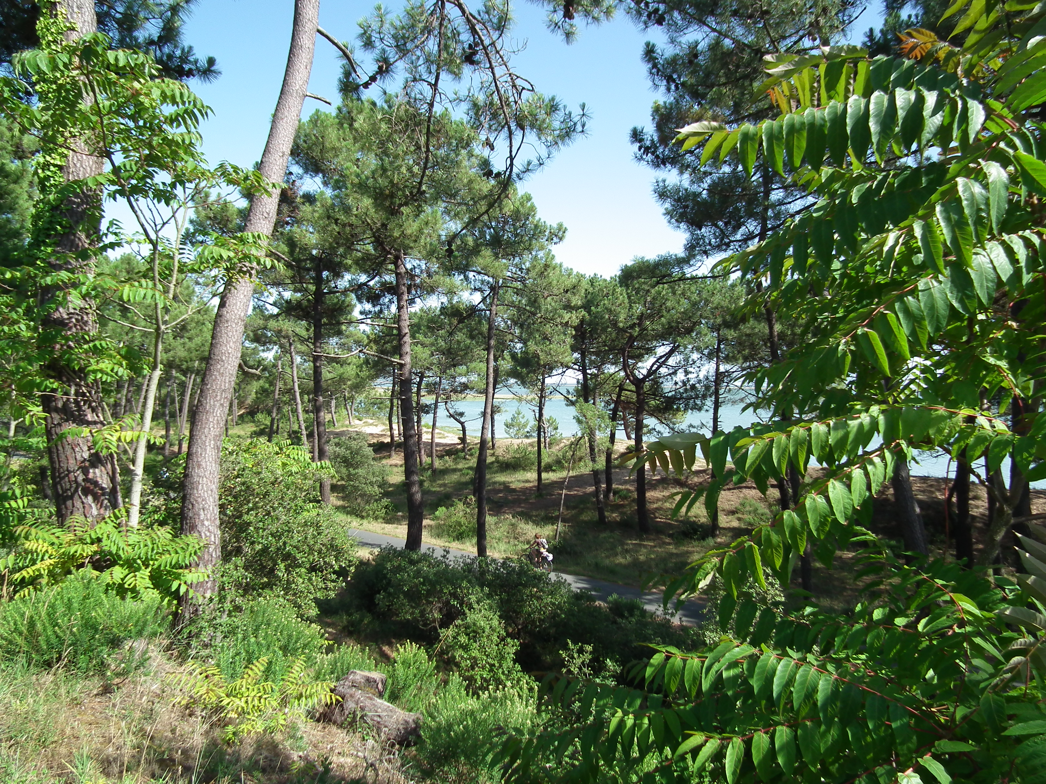 EuroVelo 1 à Bonne Anse